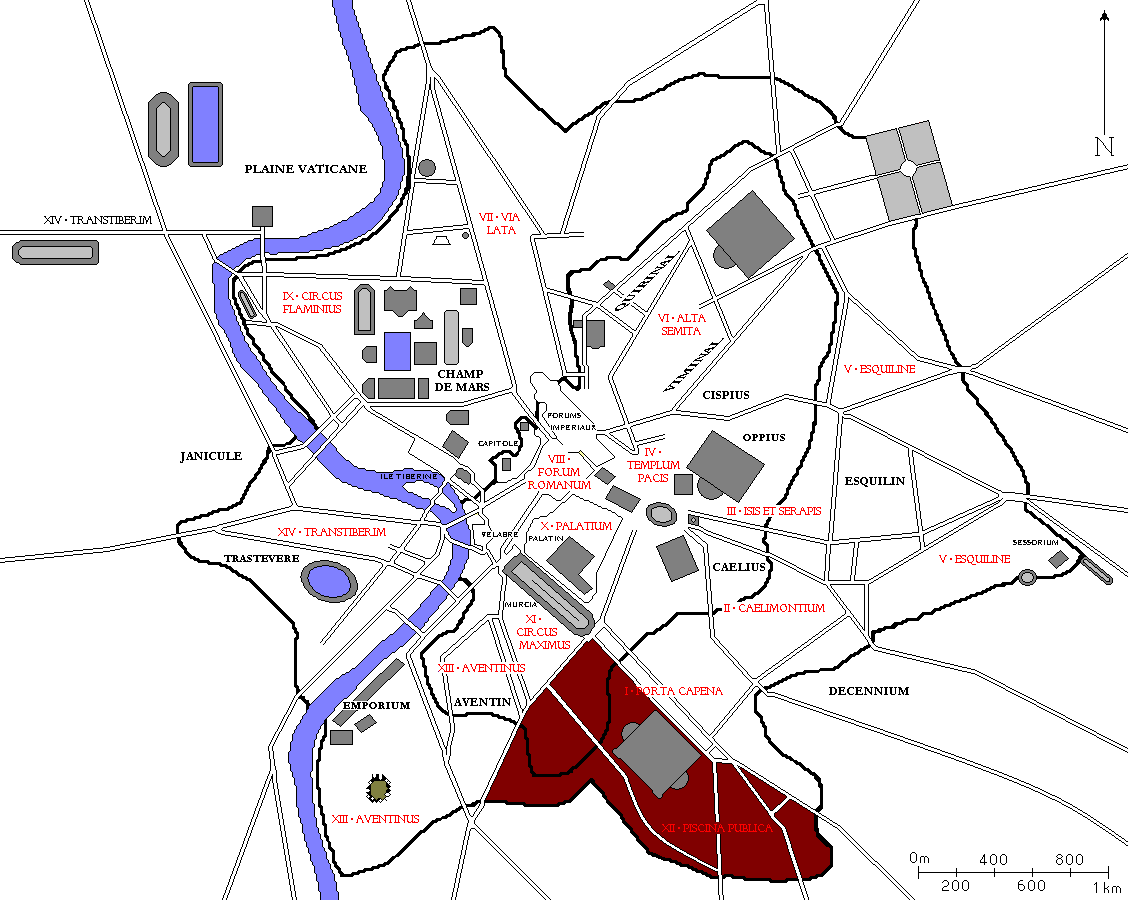 Plan de Rome avec la douzième région des 14 régions d'Auguste